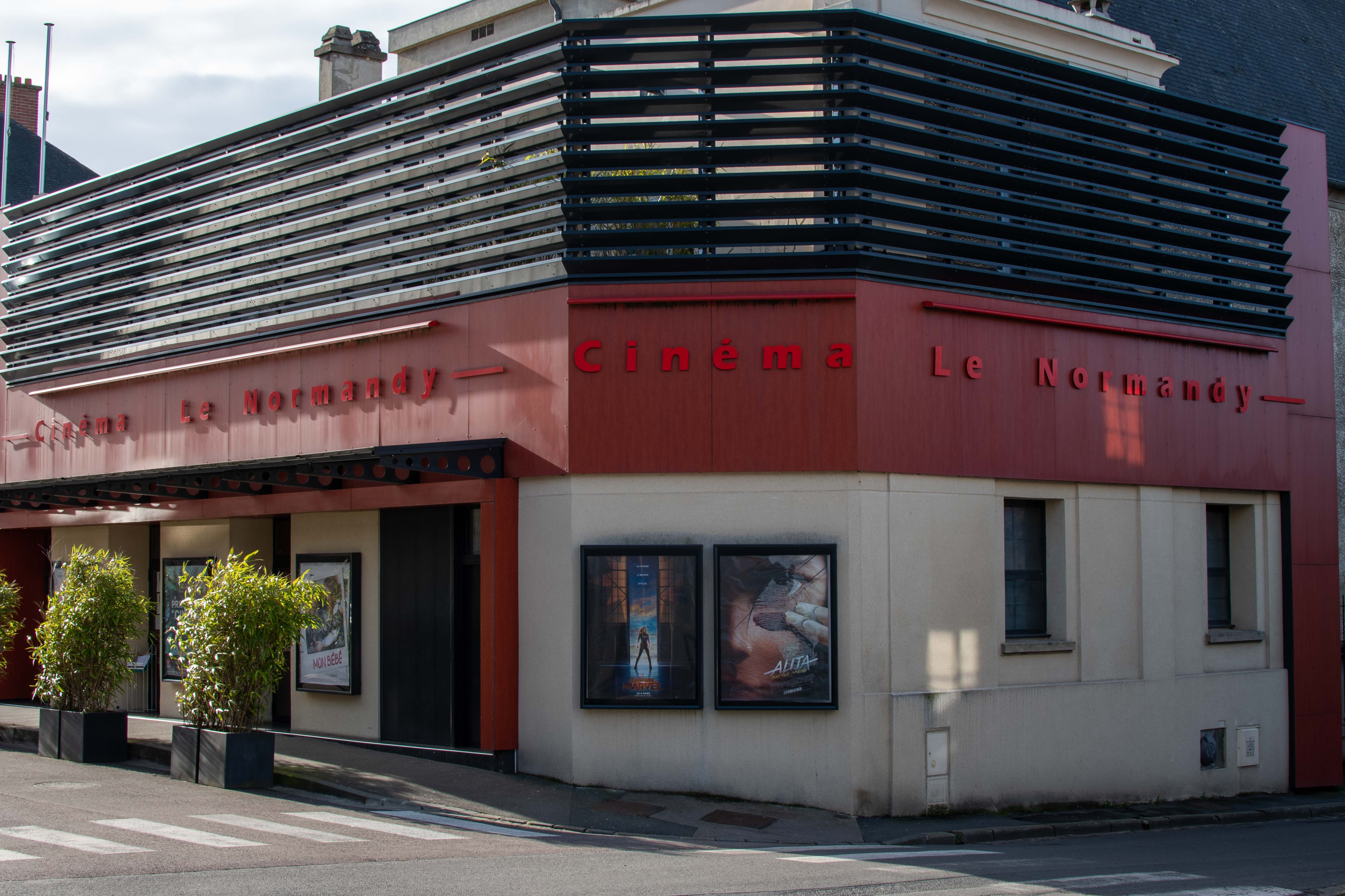 Cinéma Le Normandy à Argentan dans l'Orne en Normandie